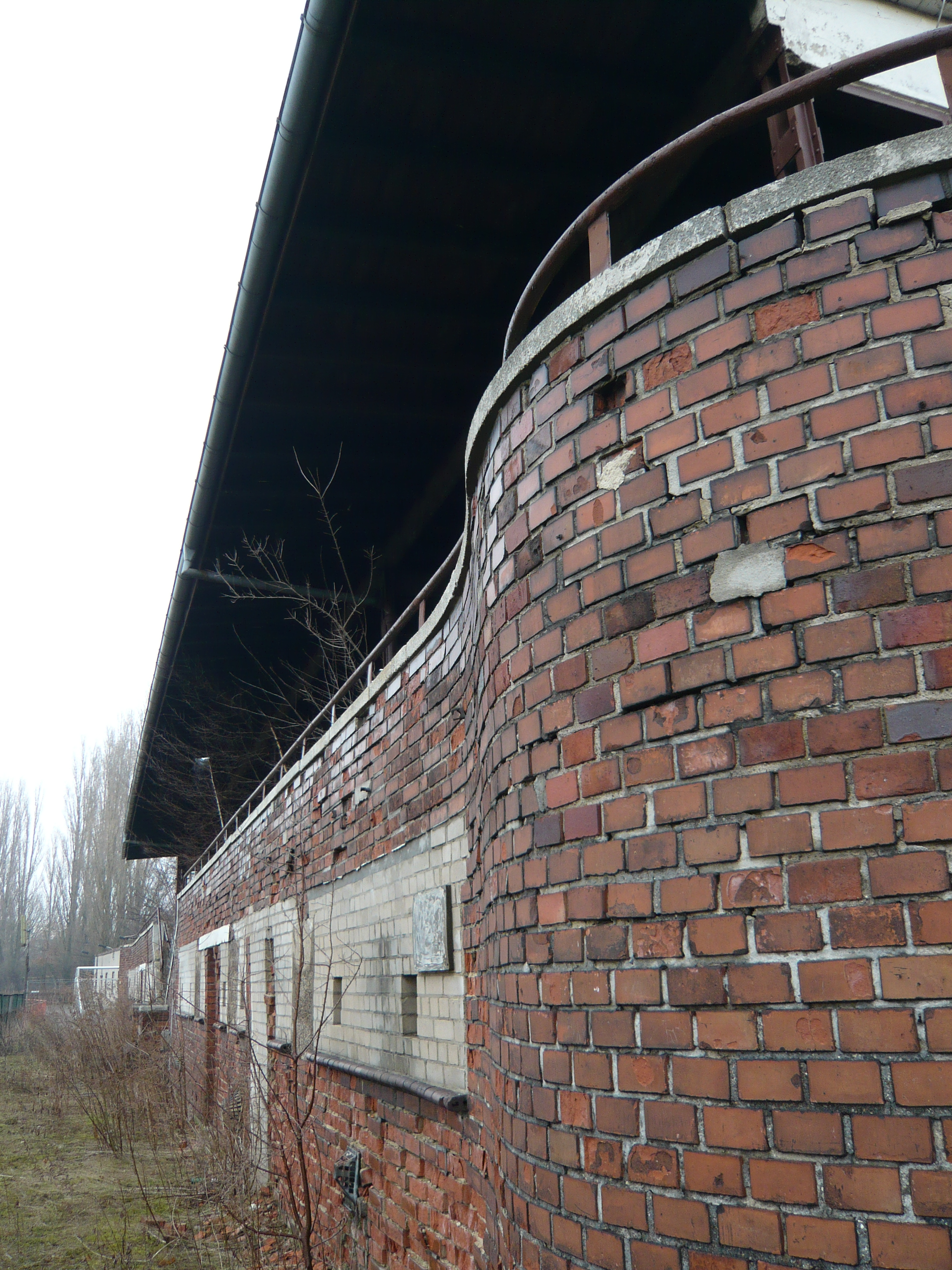 BVG-Stadion, Tribüne seitliche Ansicht